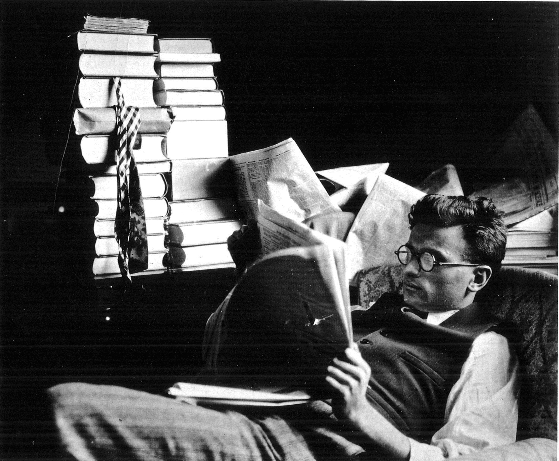 Mario Einaudi in the 1920s